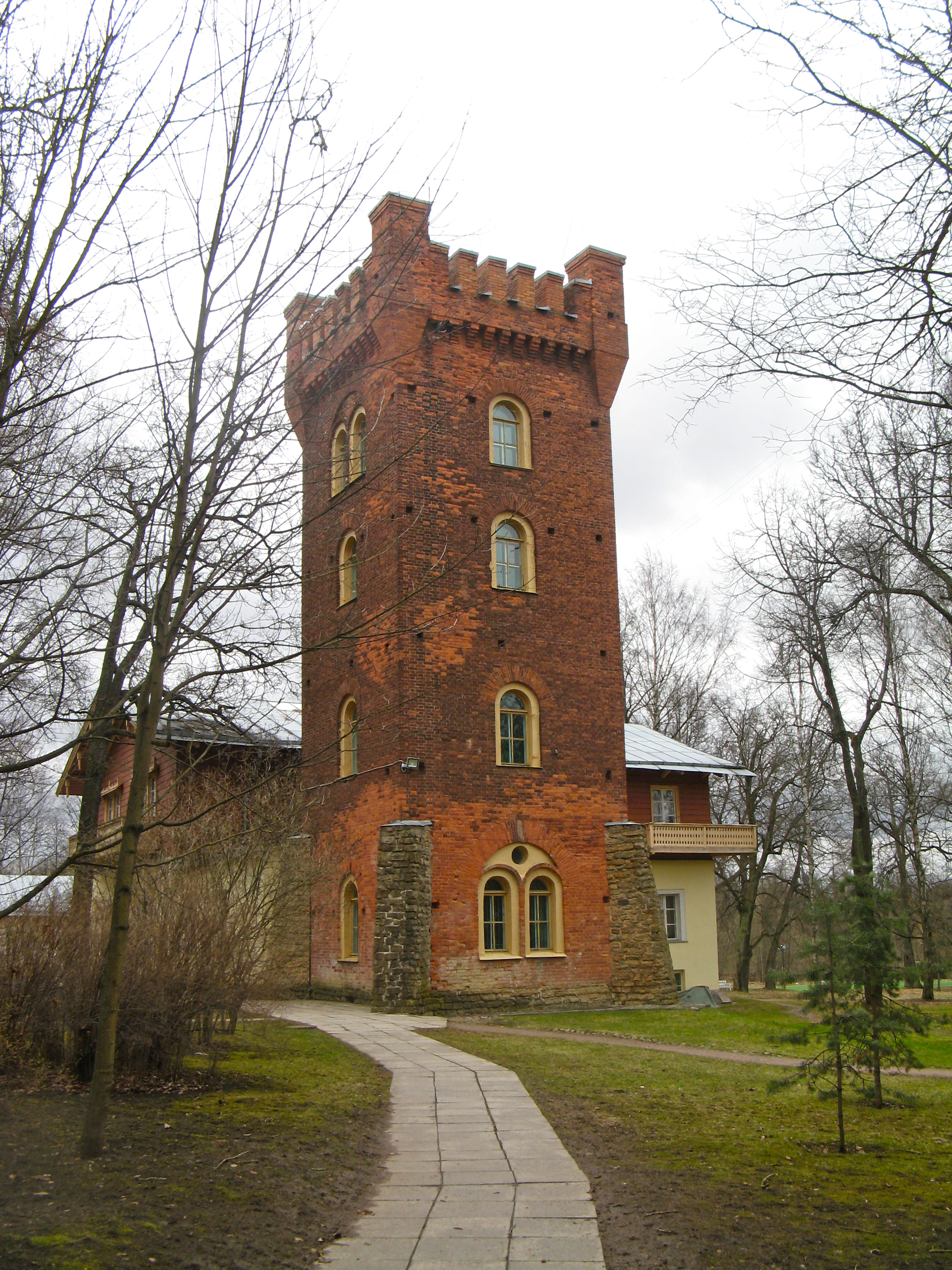 Дача А.П. Брюллова: Елизаветинская улица, 2, Павловск, Пушкинский район, Санкт-Петербург